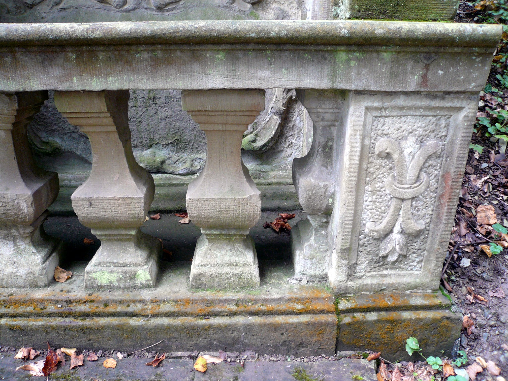 Kapellenkreuzweg Kloster Altstadt, Station, Balustrade